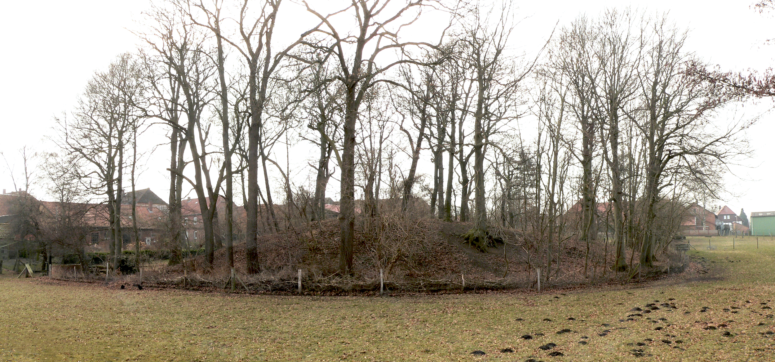 Hügel der Turmhügelburg derer von Rautenberg in Rautenberg